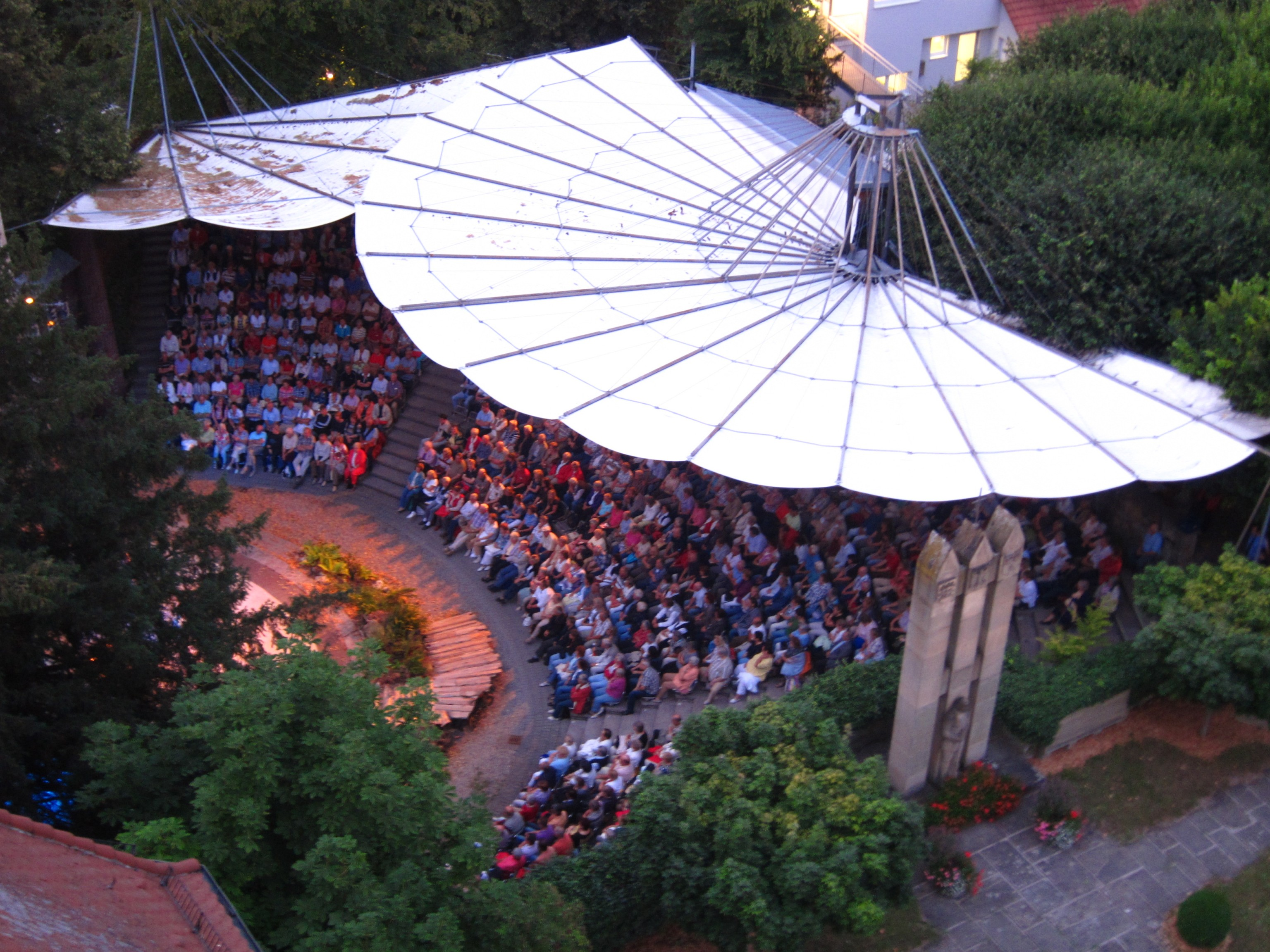 Bühne im Schlossgraben der Freilichtspiele Neuenstadt. Aufgenommen vom Neuenstädter Torturm